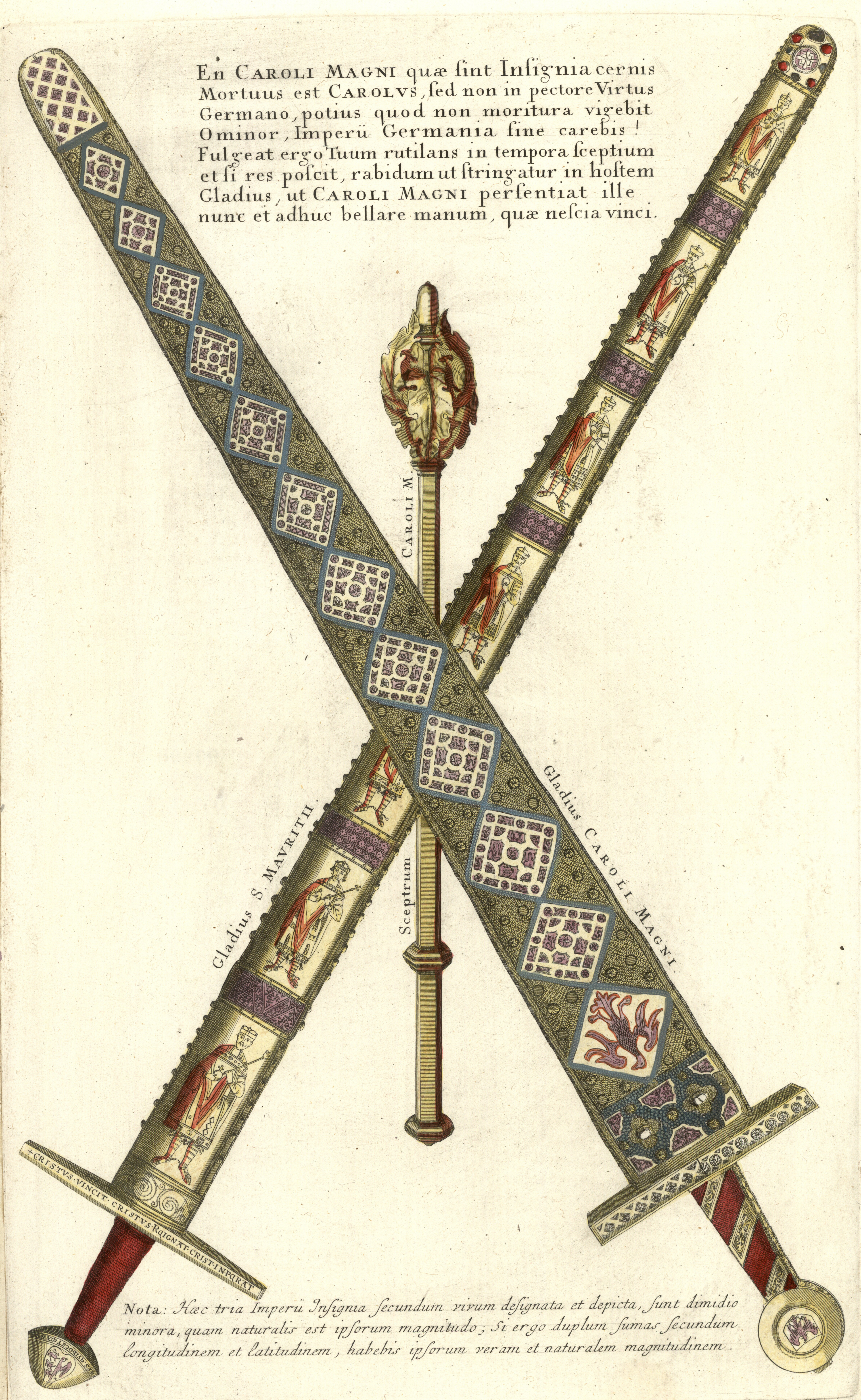 Authentica repraesentatio duorum Insignivm Imperii Romano-Germanici; Extat in Officina Homanniana. A. 1755 / [Daselbst zu finden bey Peter Conrad Monath] – Reichsschwert, Zermeonienschwert und Zepter